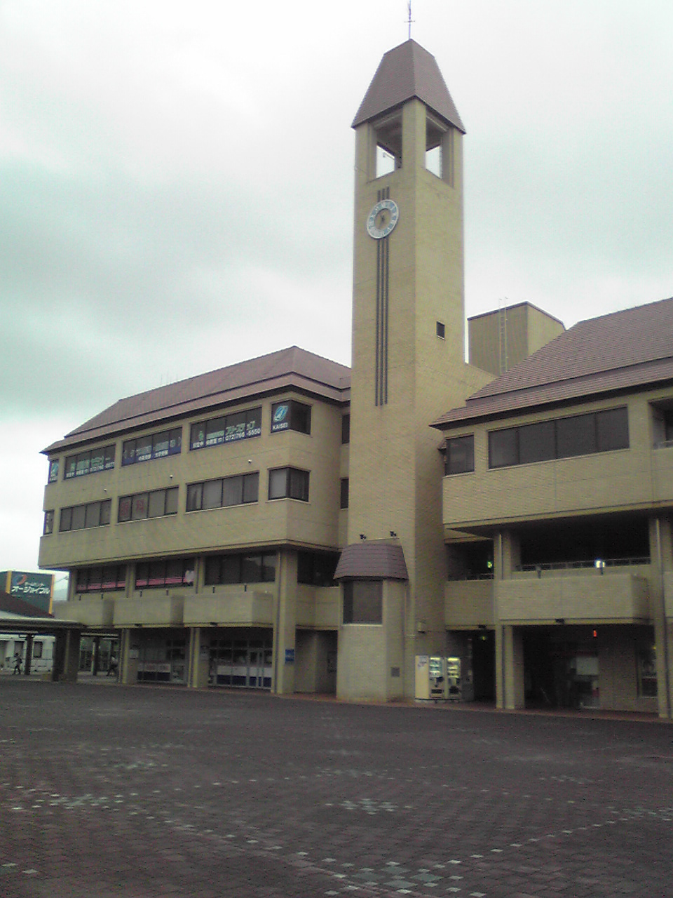 1 Chome-2 Matsuodai, Inagawa-chō, Kawabe-gun, Hyōgo-ken 666-0261, Japan